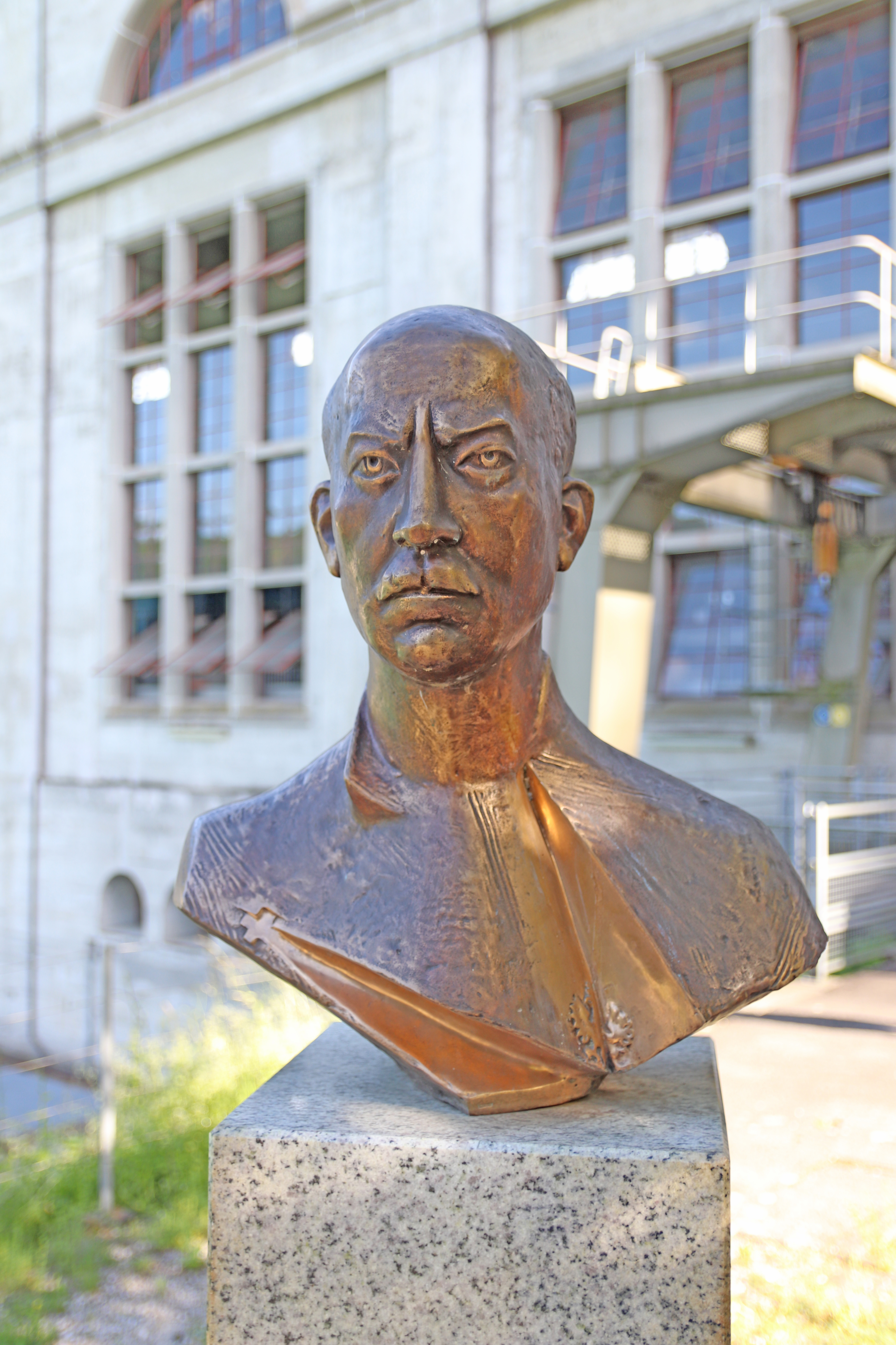 Büste von Gabriel Narutowicz am Kraftwerk Mühleberg. Die Büste befindet sich bleibend auf allgemein zugänglichem Grund und darf deswegen frei abgebildet werden. Die Abbildung „darf angeboten, veräussert, gesendet oder sonstwie verbreitet werden“ (Art. 27 Abs. 1 URG – Werke auf allgemein zugänglichem Grund). Die Abbildung entspricht somit der schweizerischen Regelung zur Panormafreiheit.